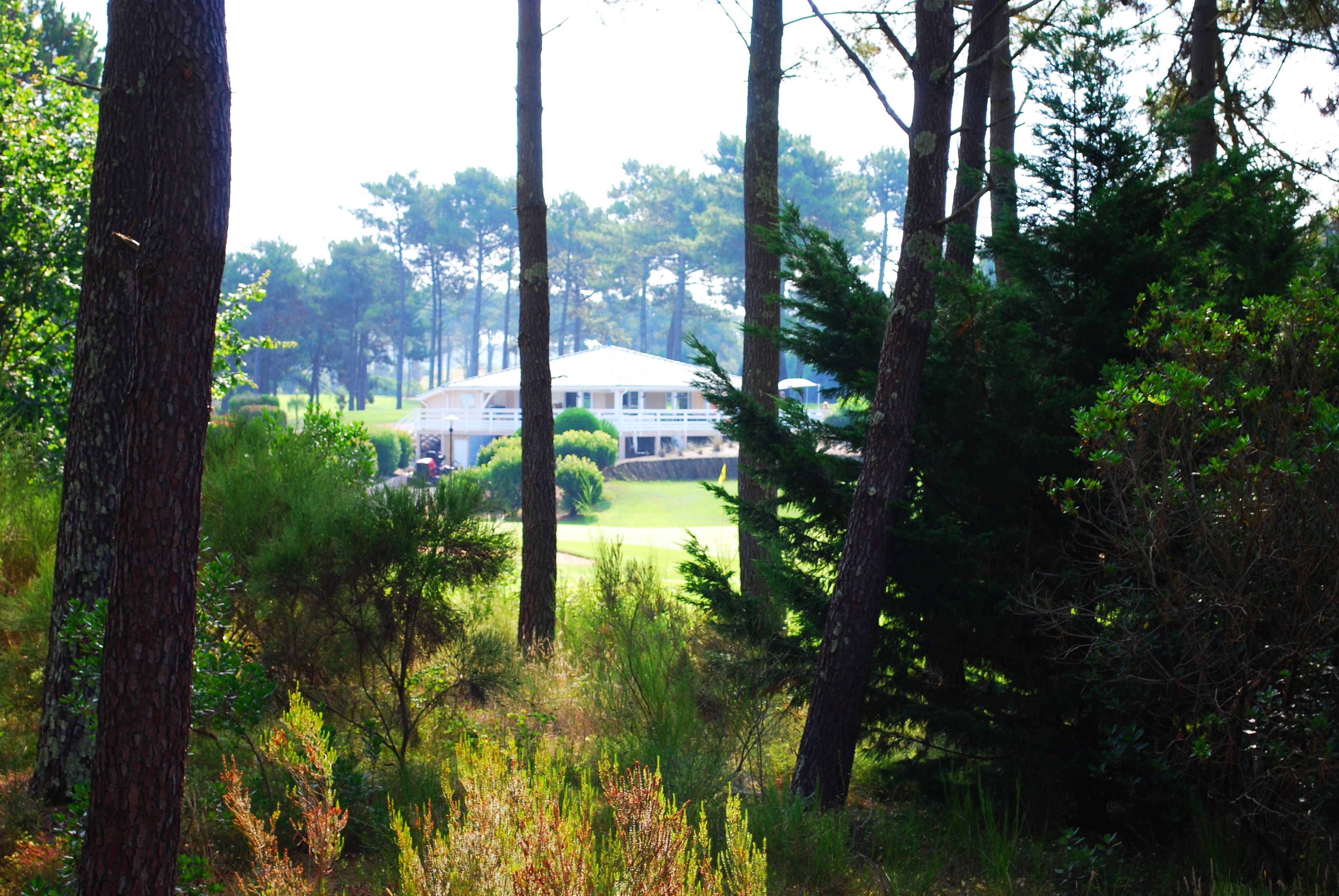 Haus am Golfplatz in der Naturisten-Siedlung "La Jenny" bei Le Porge im Südwesten Frankreichs inmitten des Waldes